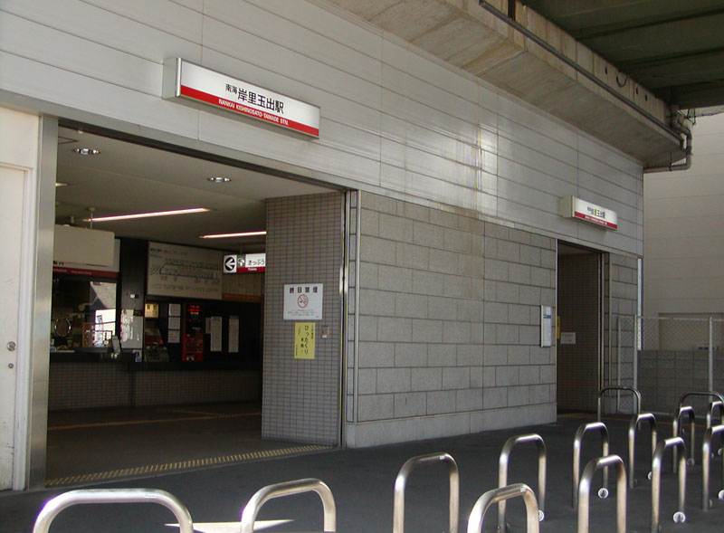 南海電鉄岸里玉出駅・岸里口（大阪市西成区）。2007年3月、投稿者撮影。